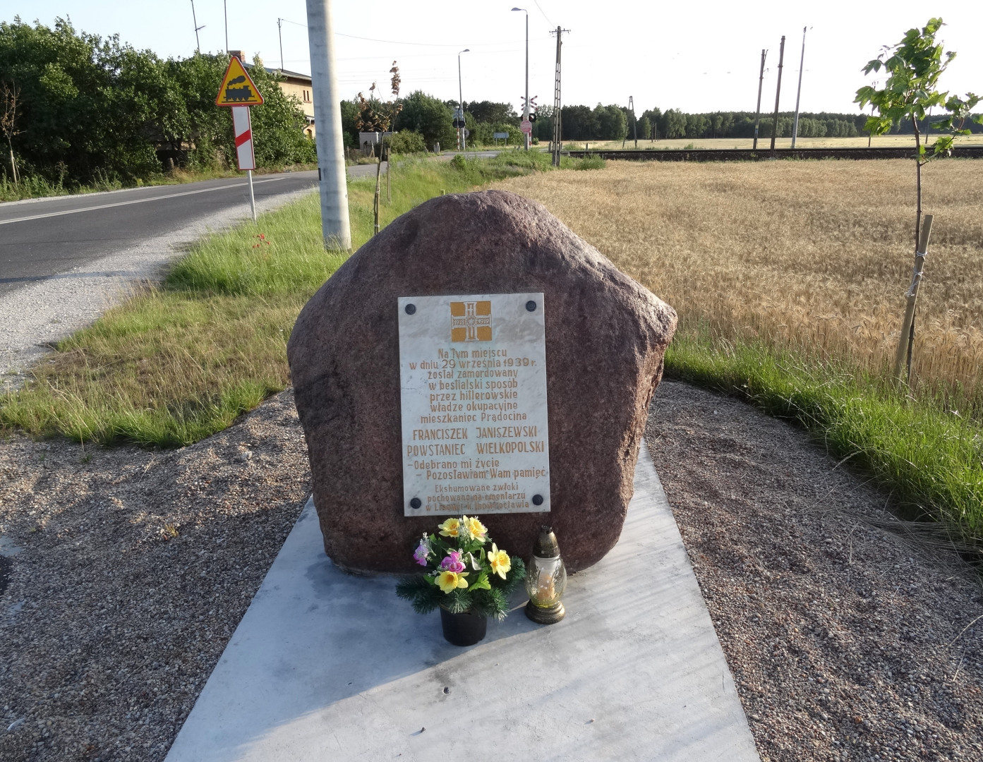 Prądocin, gmina Nowa Wieś Wielka, powiat bydgoski. Głaz z tablicą pamiątkową